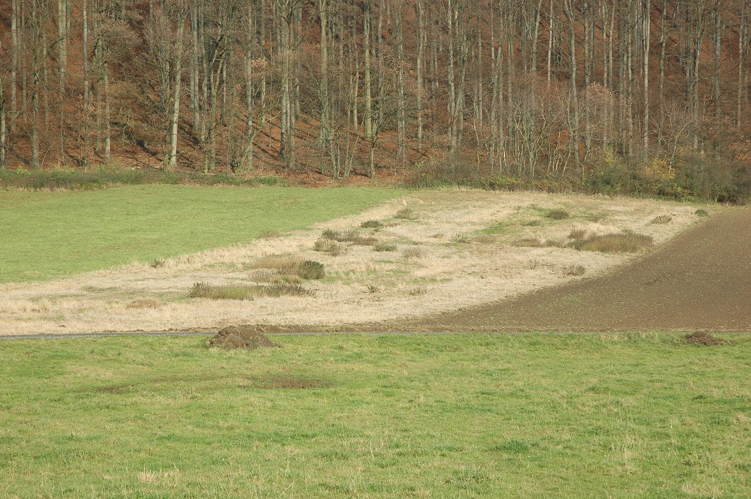 Grünbrache (zwischen Acker und Weidefläche), November 2007, Ort: Hess. Oldendorf (Niedersachsen)